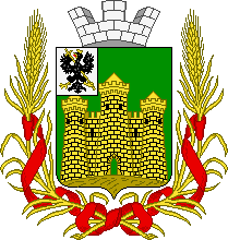 Неутвержденный проект герба Мглина